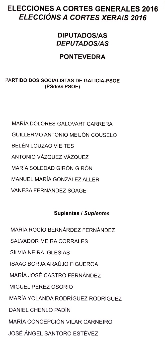 Papeletas electorales de las Elecciones a Cortes Generales de España de 2016, Provincia de Pontevedra.